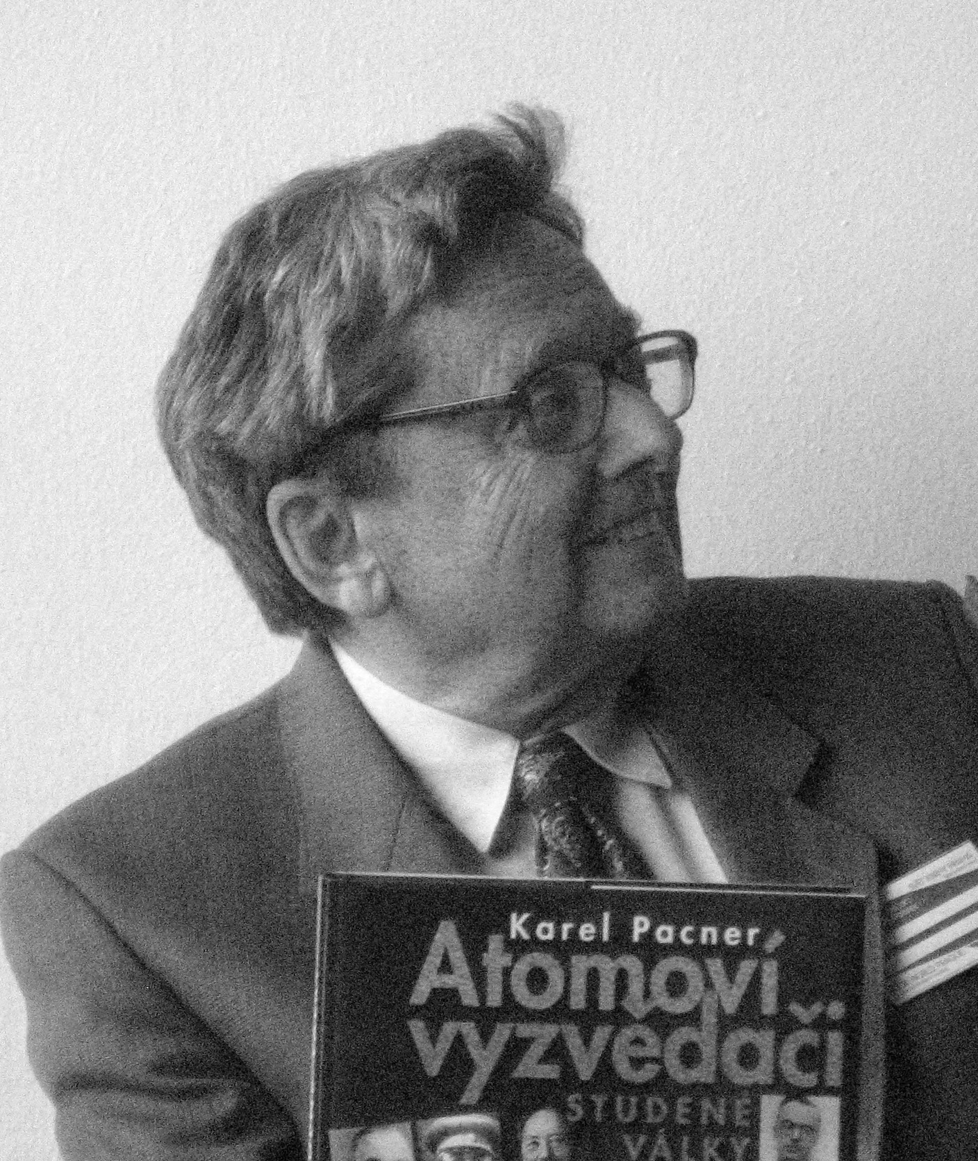 Antonín Vítek během prezentace knihy Půlstoletí kosmonautiky, které je spoluautorem, na Světu knihy 2009